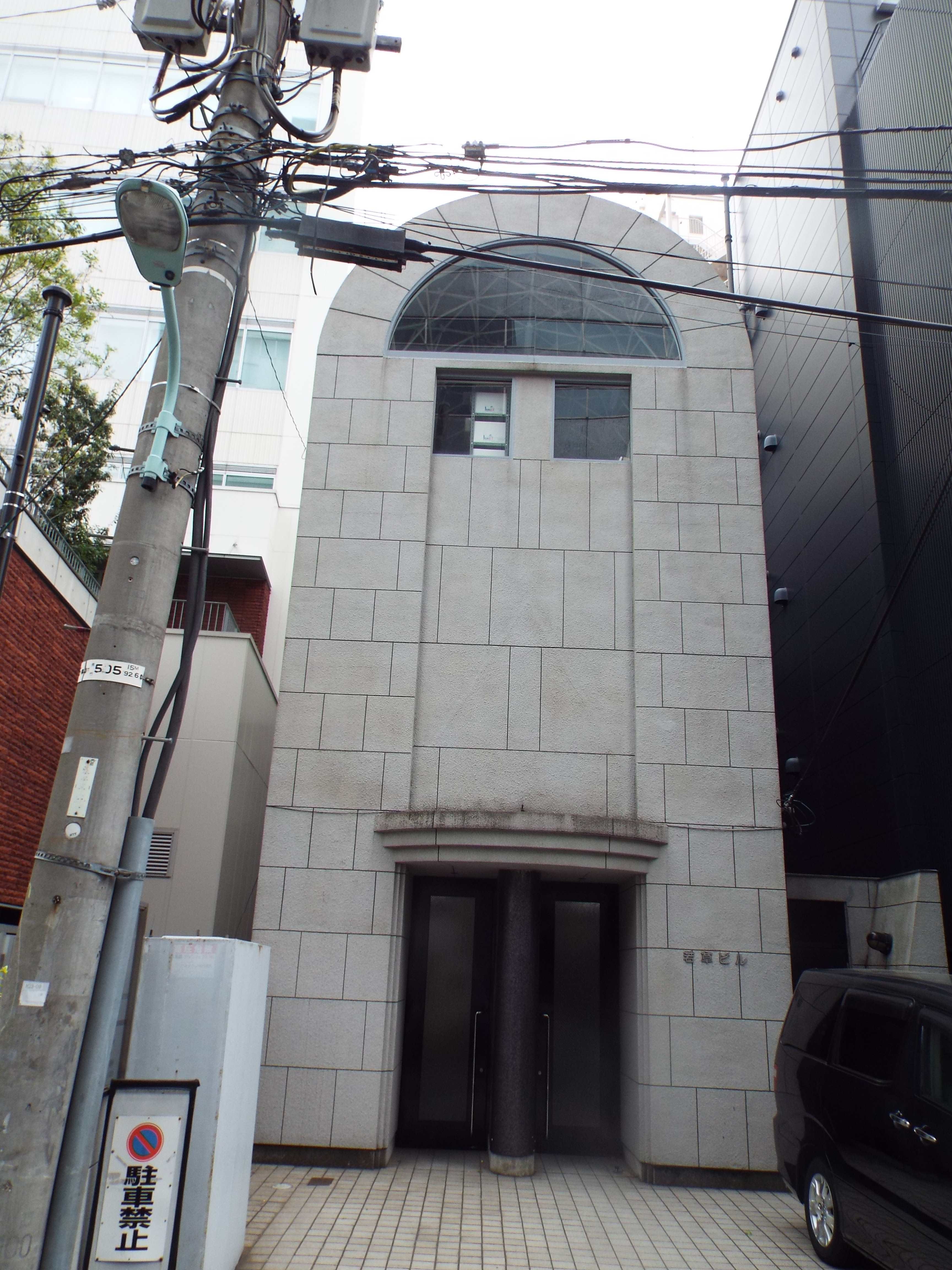 日本文化チャンネル桜：事務局の入り口